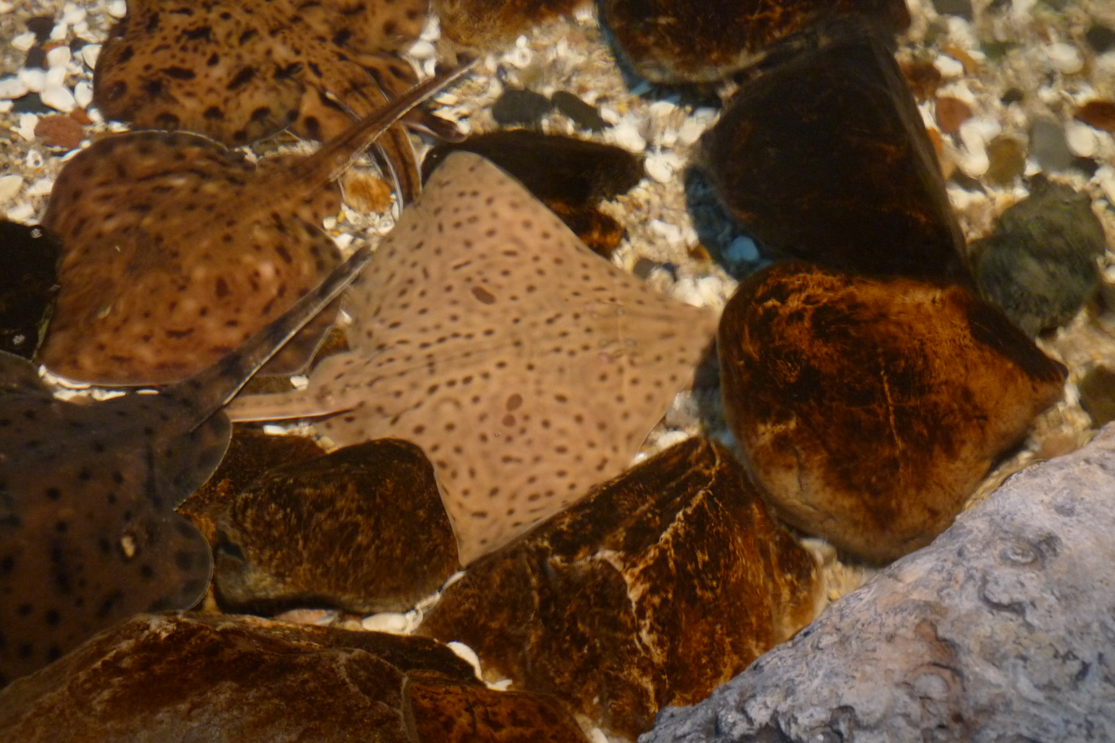 Aquarium des raies au musée-aquarium Exploramer de Sainte-Anne-des-Monts